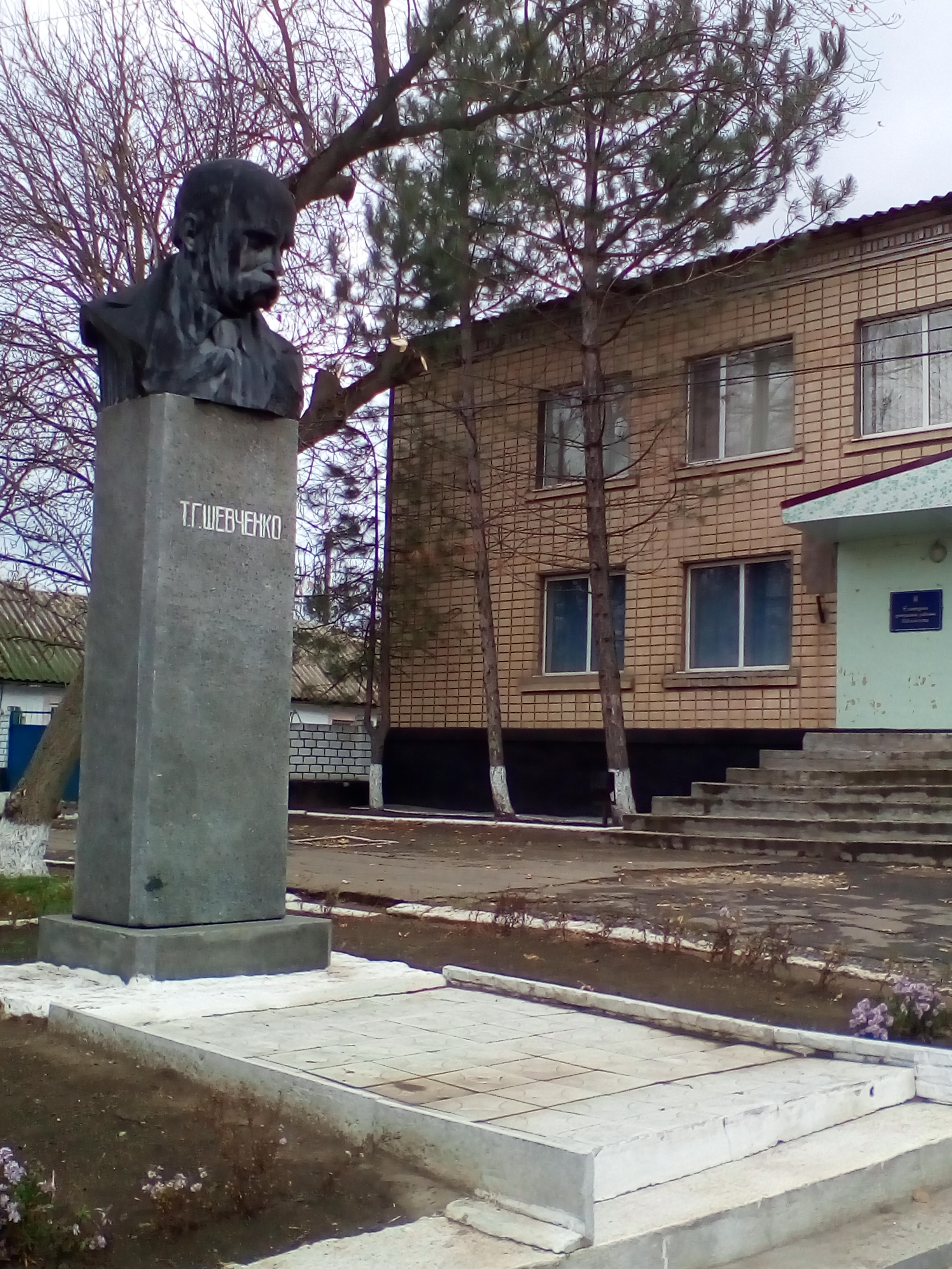 Памятник Т. Шевченко